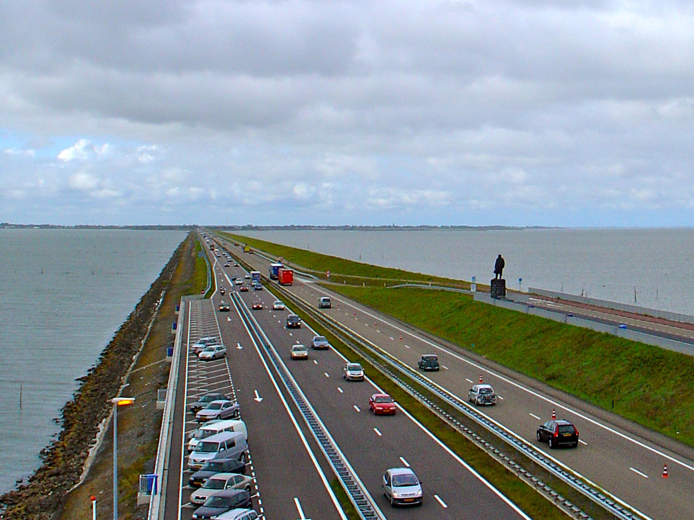 Afsluitdijk met standbeeld ir Cornelis Lely